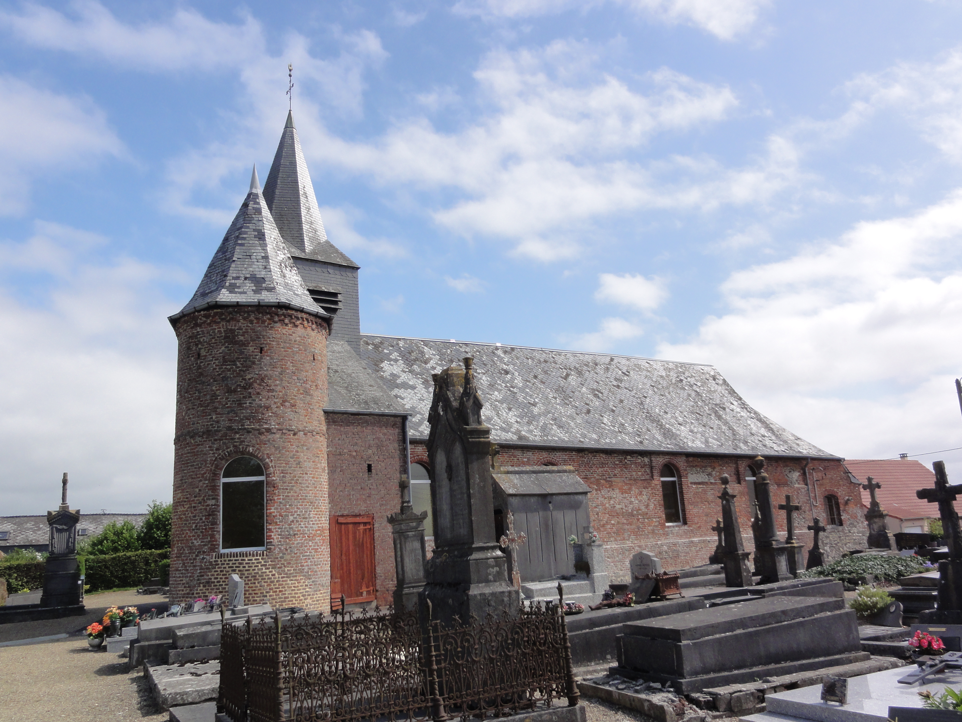 Froidestrées (Aisne) église, latéral